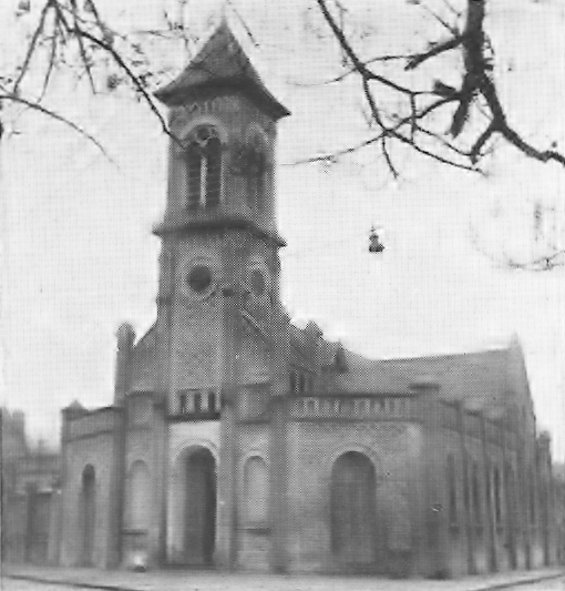 Eglise de la Faisanderie à Villeneuve-le-Roi (France)